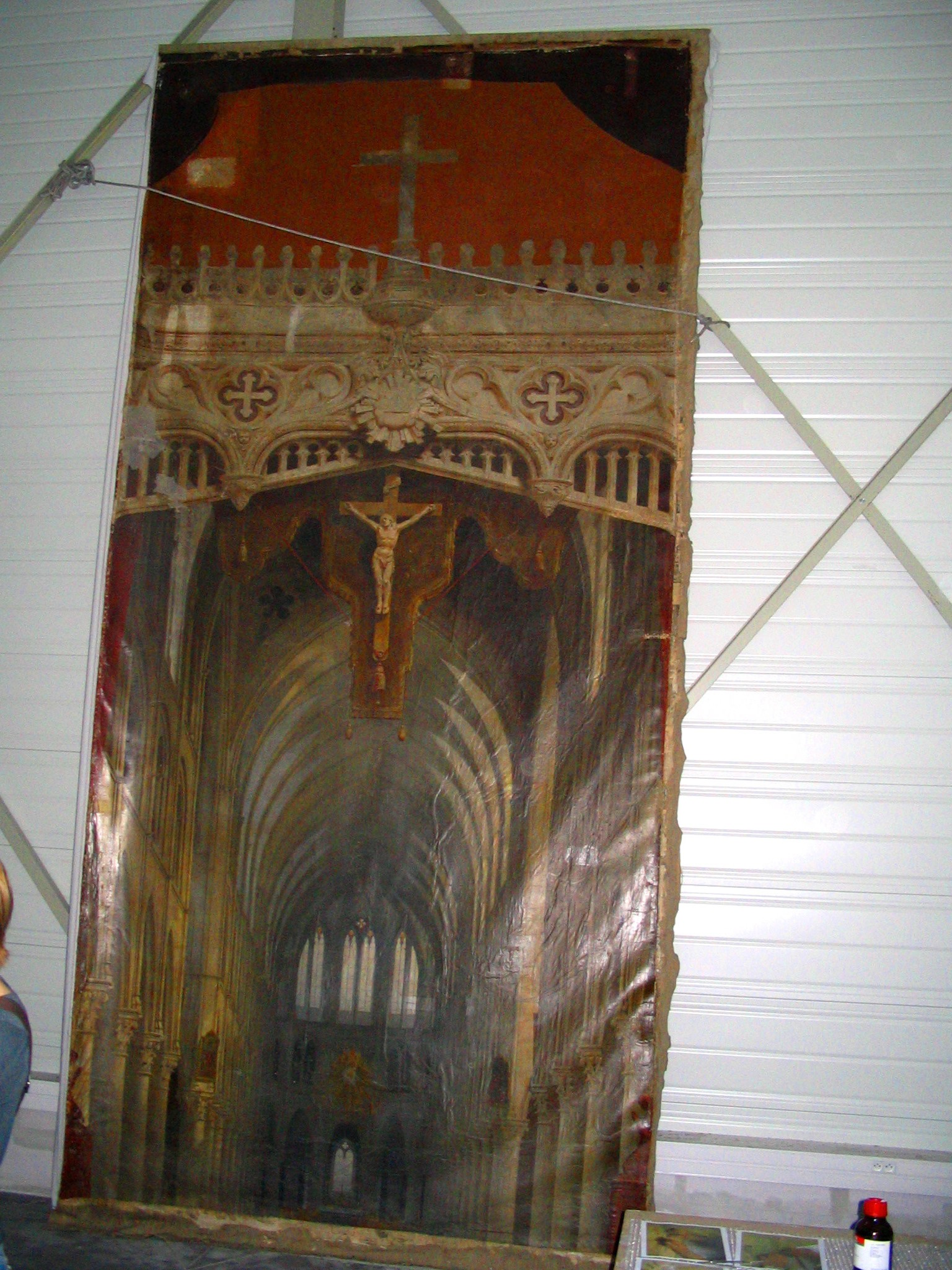 Diorama de Louis Daguerre, en cours de restauration, panneau central, Bry-sur-Marne, France